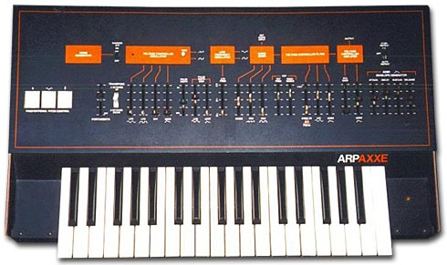 sintetizzatore ARP Axxe Licensing Categoria:Sintetizzatori Categoria:Sintetizzatori ARP